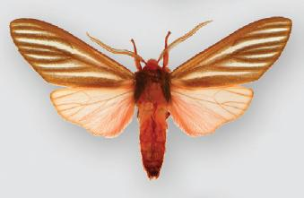 Pseudohemihyalea sonorosa male